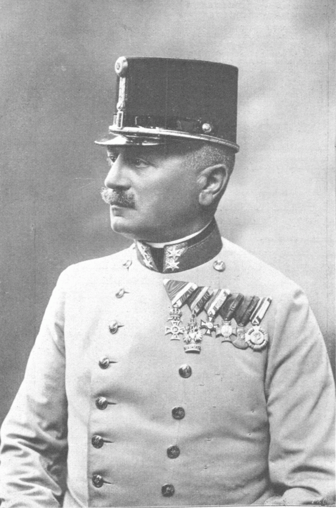 Paul Freiherr Puhallo von Brlog (1856-1926), Austrian-Hungarian general